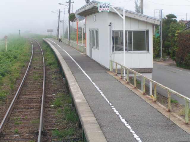 Minamino Station, Shōnai, Yamagata, Japan